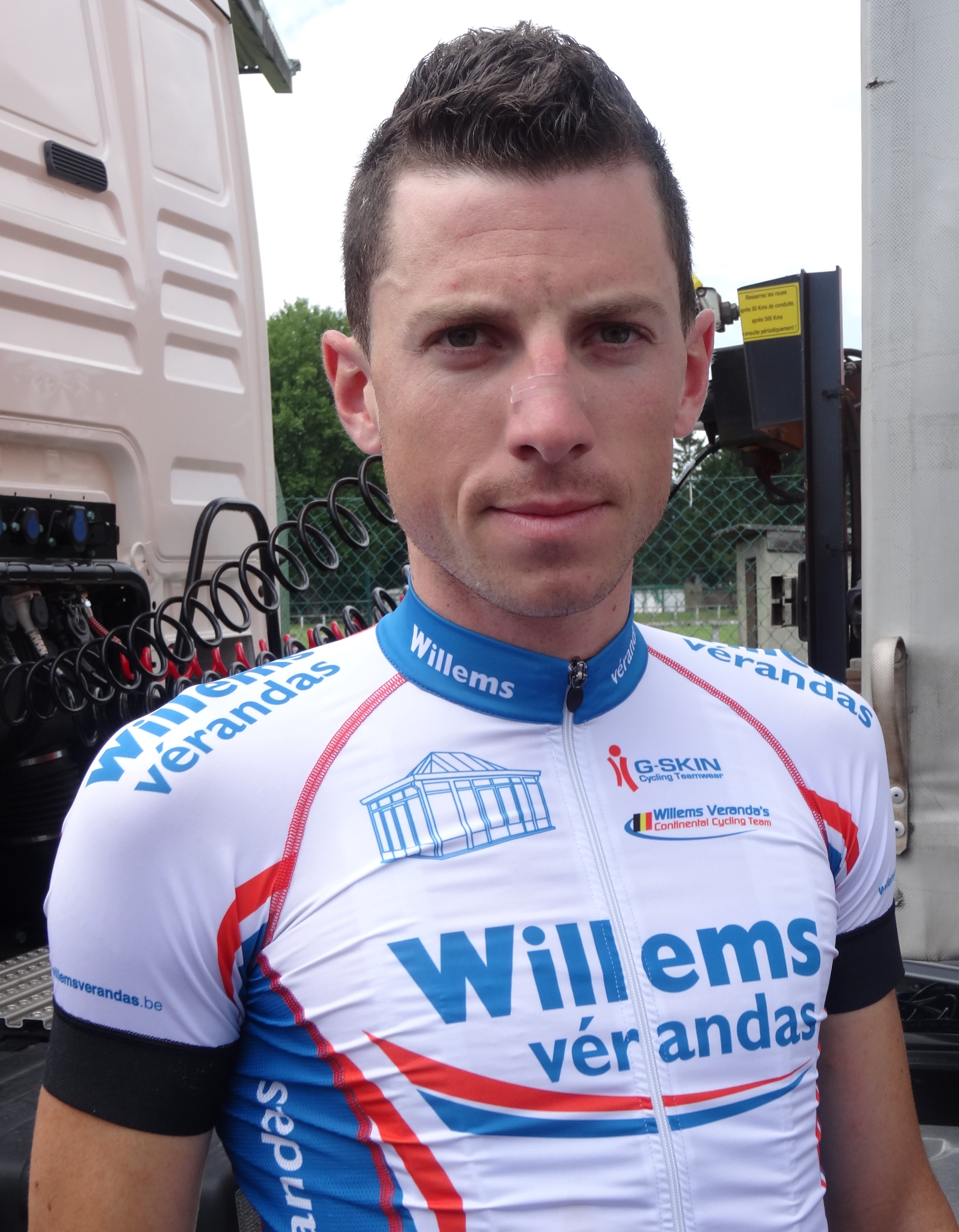 Reportage réalisé le dimanche 8 juin à l'occasion du départ du Mémorial Philippe Van Coningsloo 2014 à Wavre, Belgique.